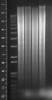 Agarosegel für Southen Blot unter UV-Licht